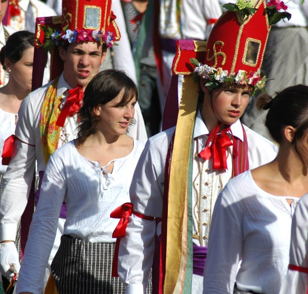 Itsasuko kabalkadaren irudia